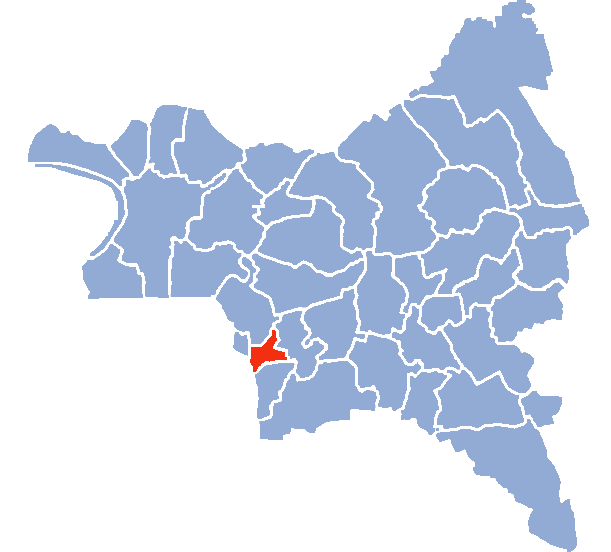 Auteur Hervé SUAUDEAU Licensing Catégorie:Cartes de Seine-saint-Denis Catégorie:Les Lilas